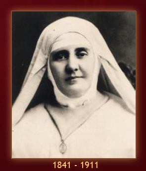 Laure Sabès, mère Marie de la Providence (1841-1911)